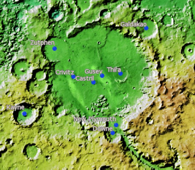 Cráter marciano Castril. (Imagen IAU/USGS/Goddard/A SU/USGS)